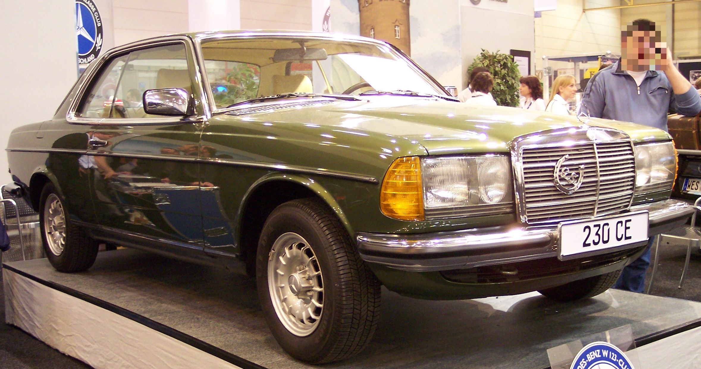 Mercedes-Benz 230 CE